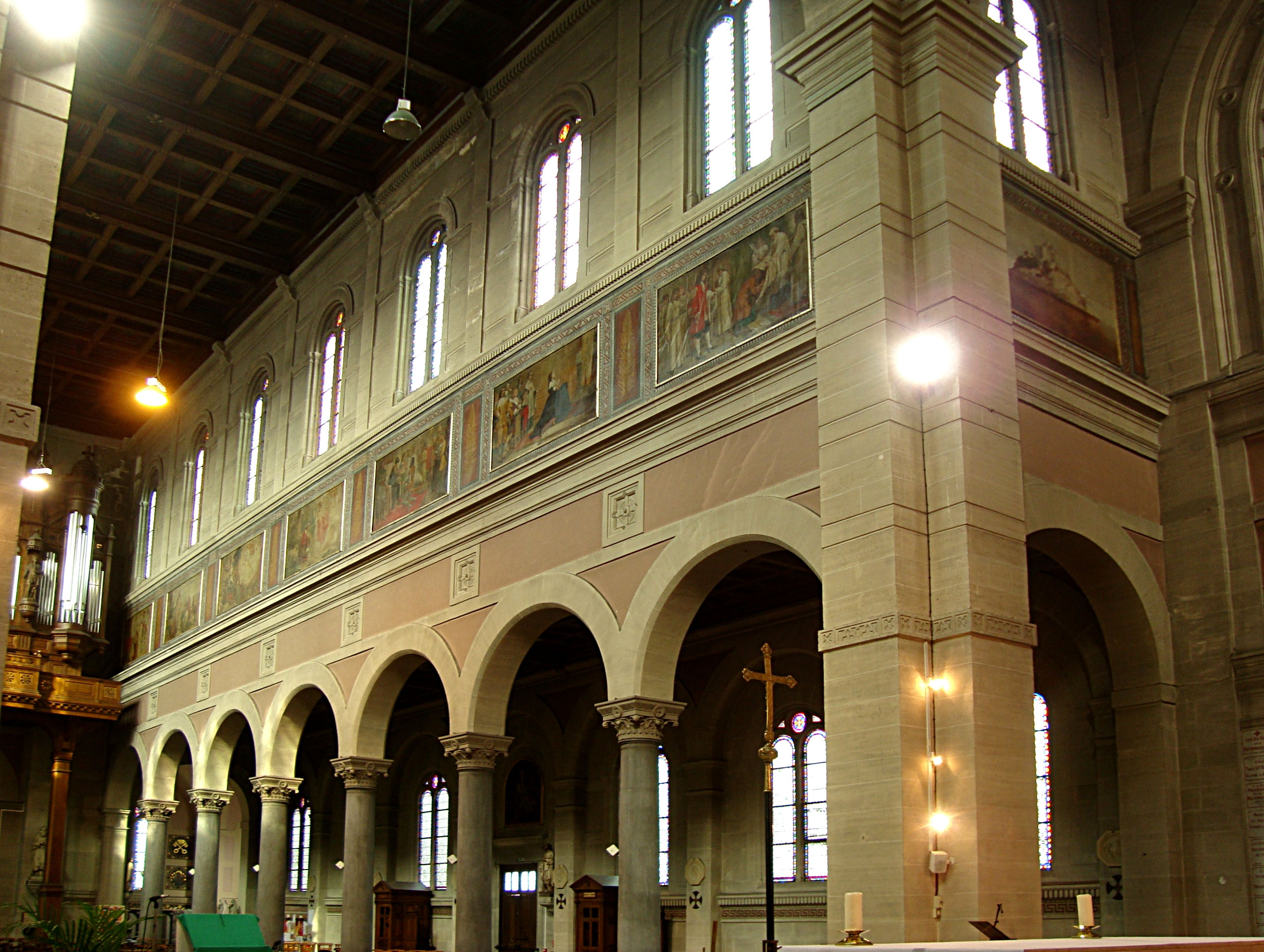 Cycle de l'histoire de Saint-Michel dans l'église Saint-Michel de Lille.